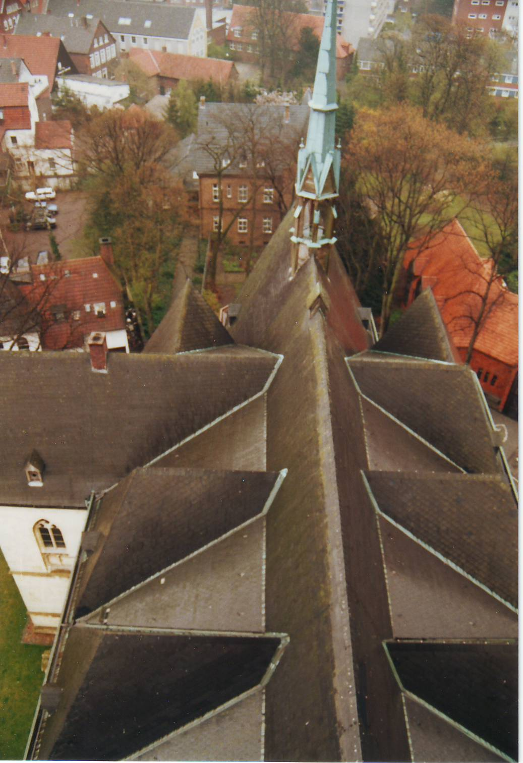 Dachansicht St. Felizitas Kirche